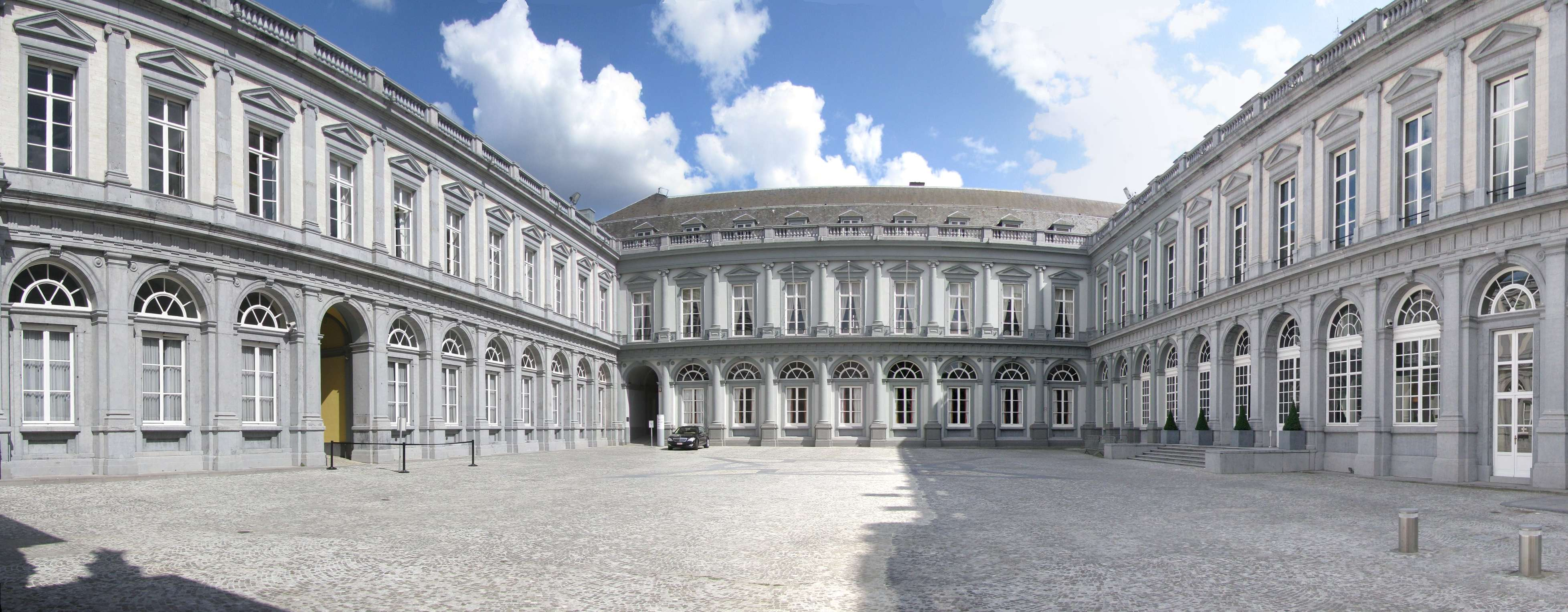 Palais d'Egmont - cour d'entrée